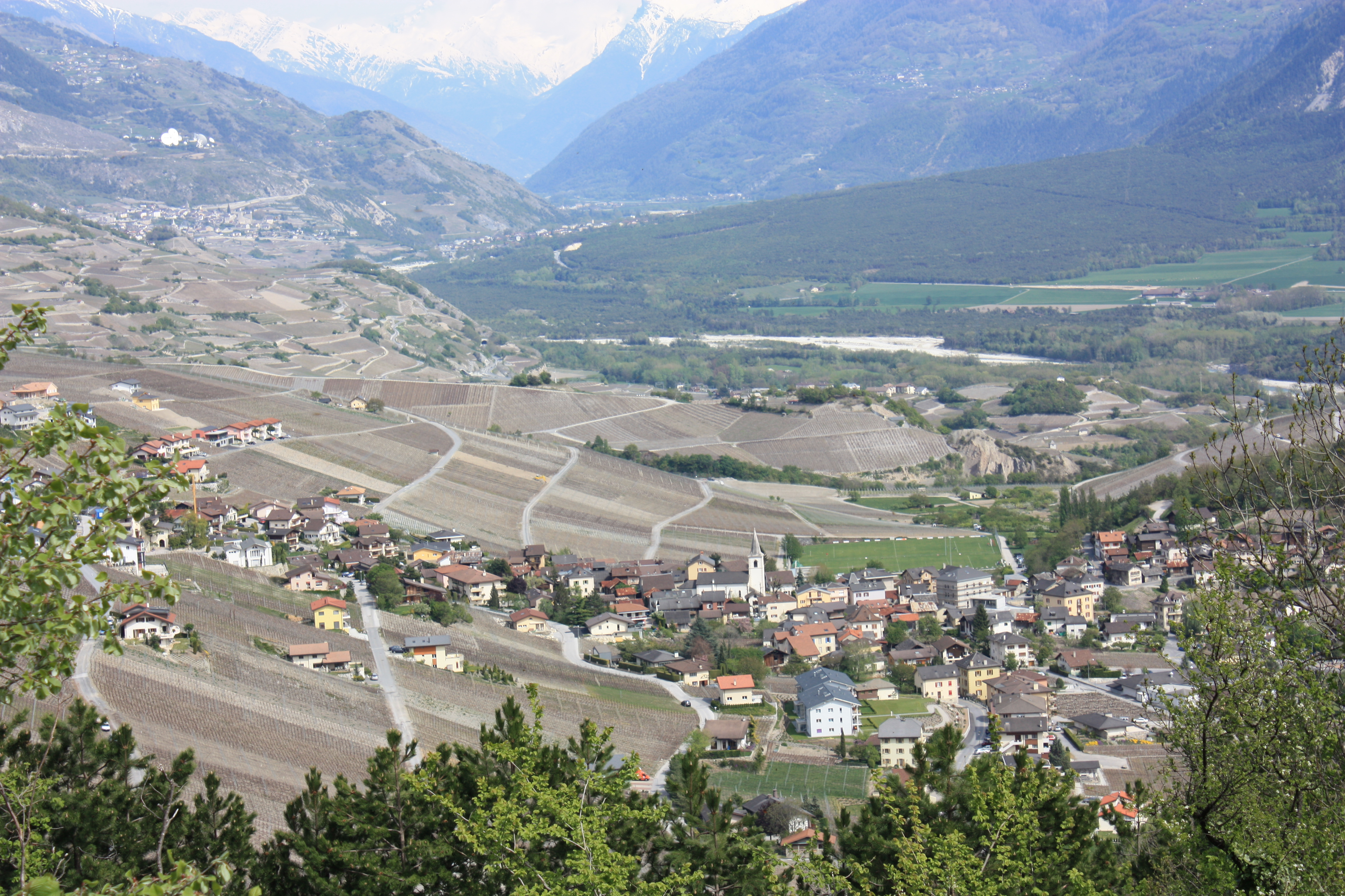 Vue sur Miège depuis le bisse qui passe en-dessus.